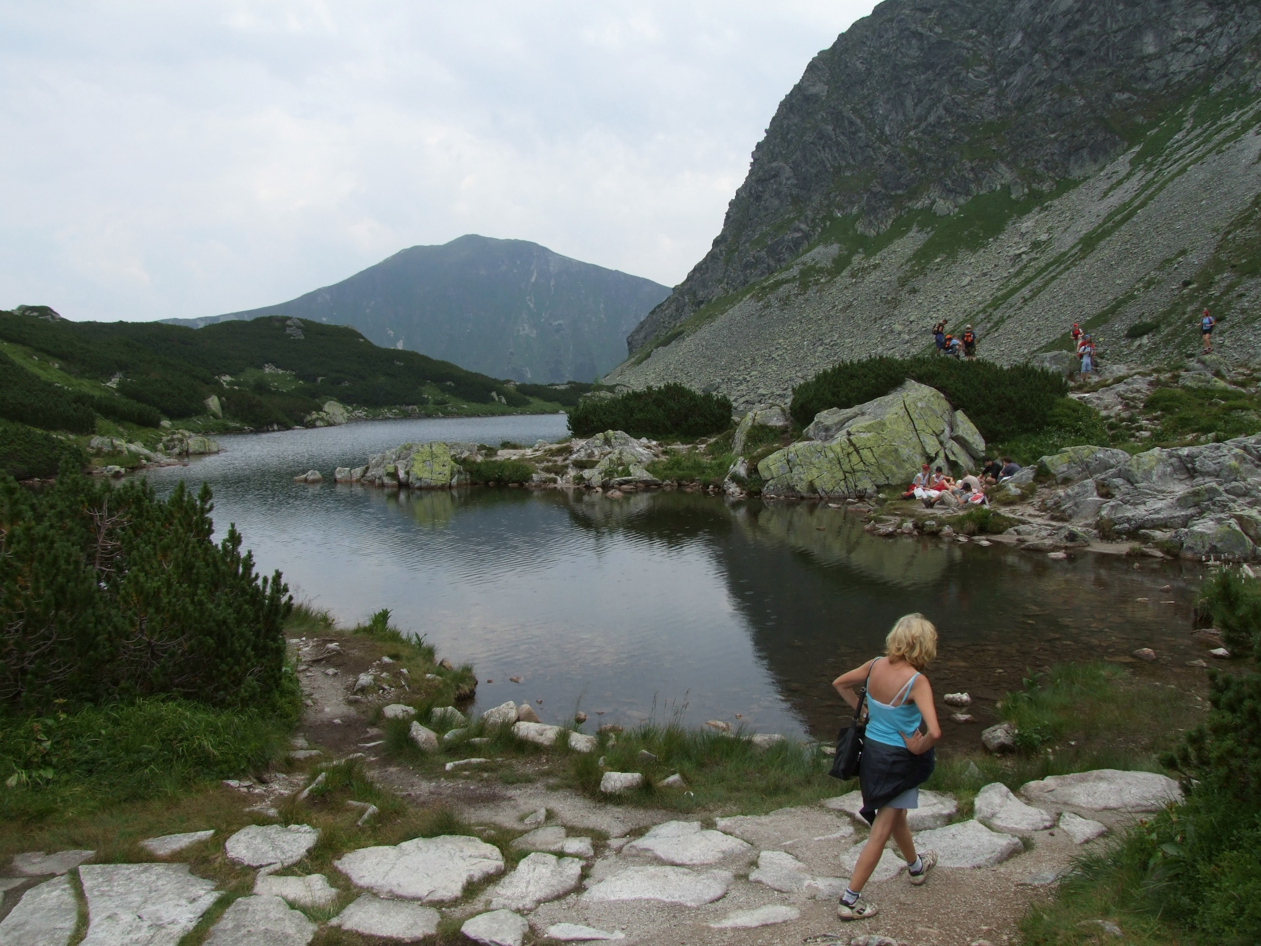 Wyżni Staw Rohacki (Stawy Rohackie (Roháčske plesá) - West Tatra Mountains)